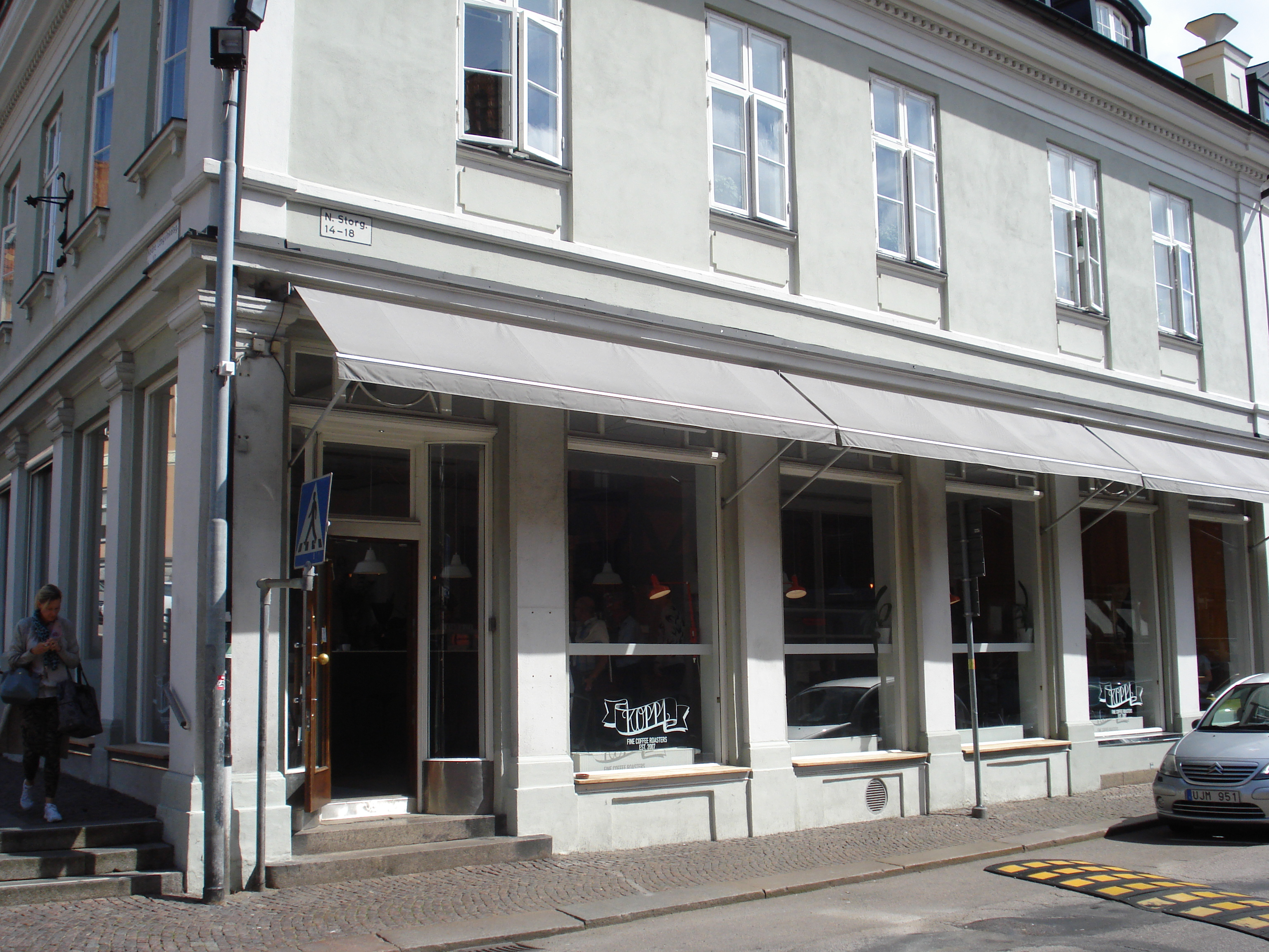 Kaféet Koppi i Helsingborg. Fotograferat 10 augusti 2017.